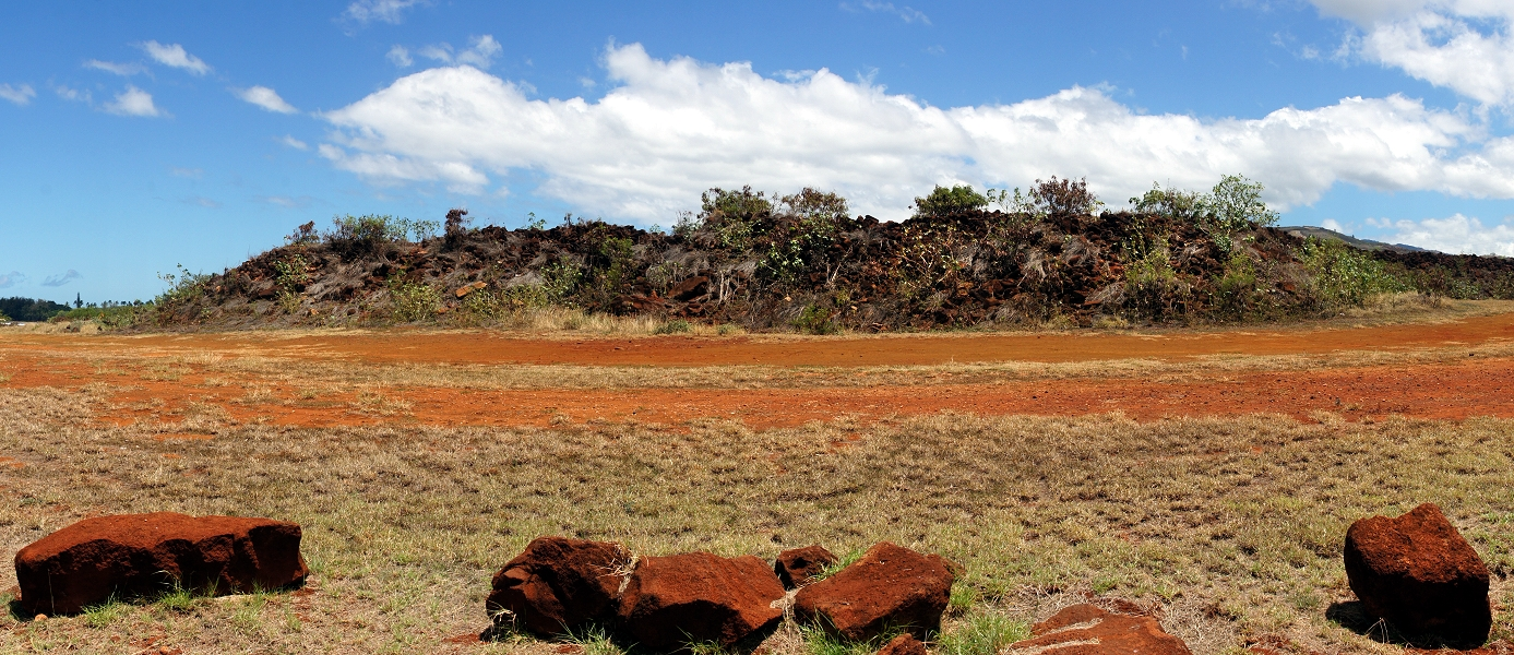 Иллюстрация для викиучебника Гавайеведение